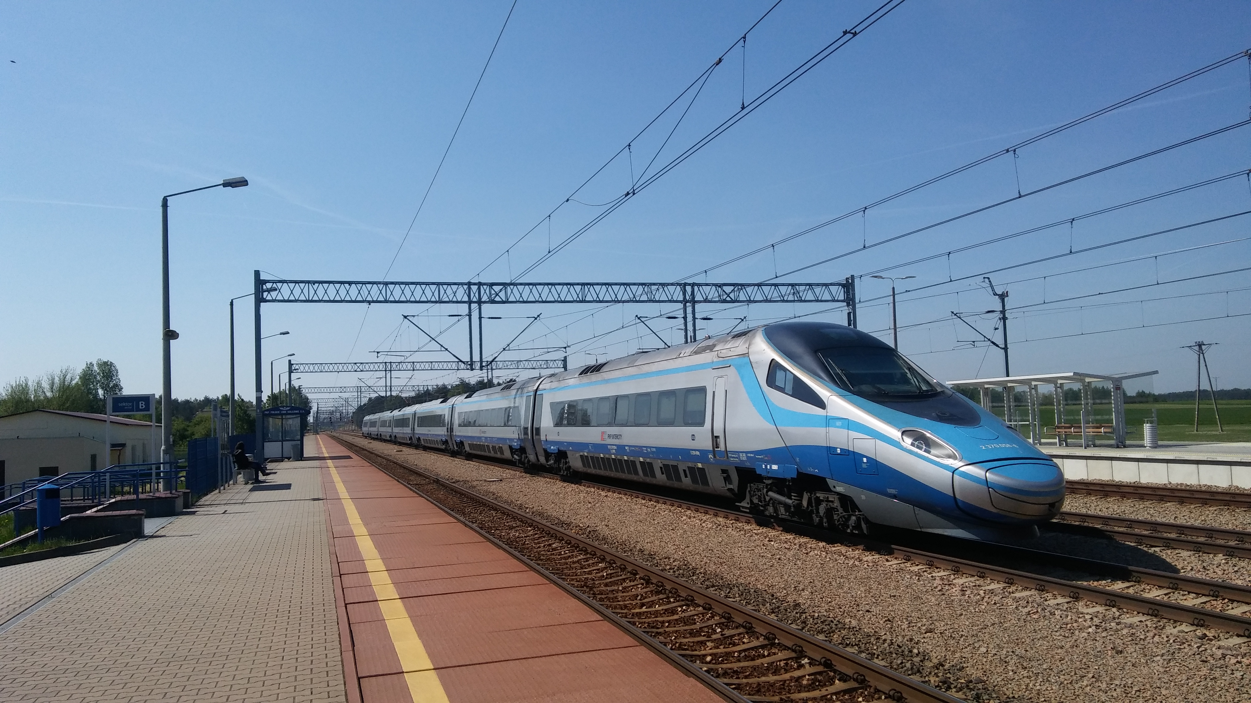 Pendolino we Włoszczowie.